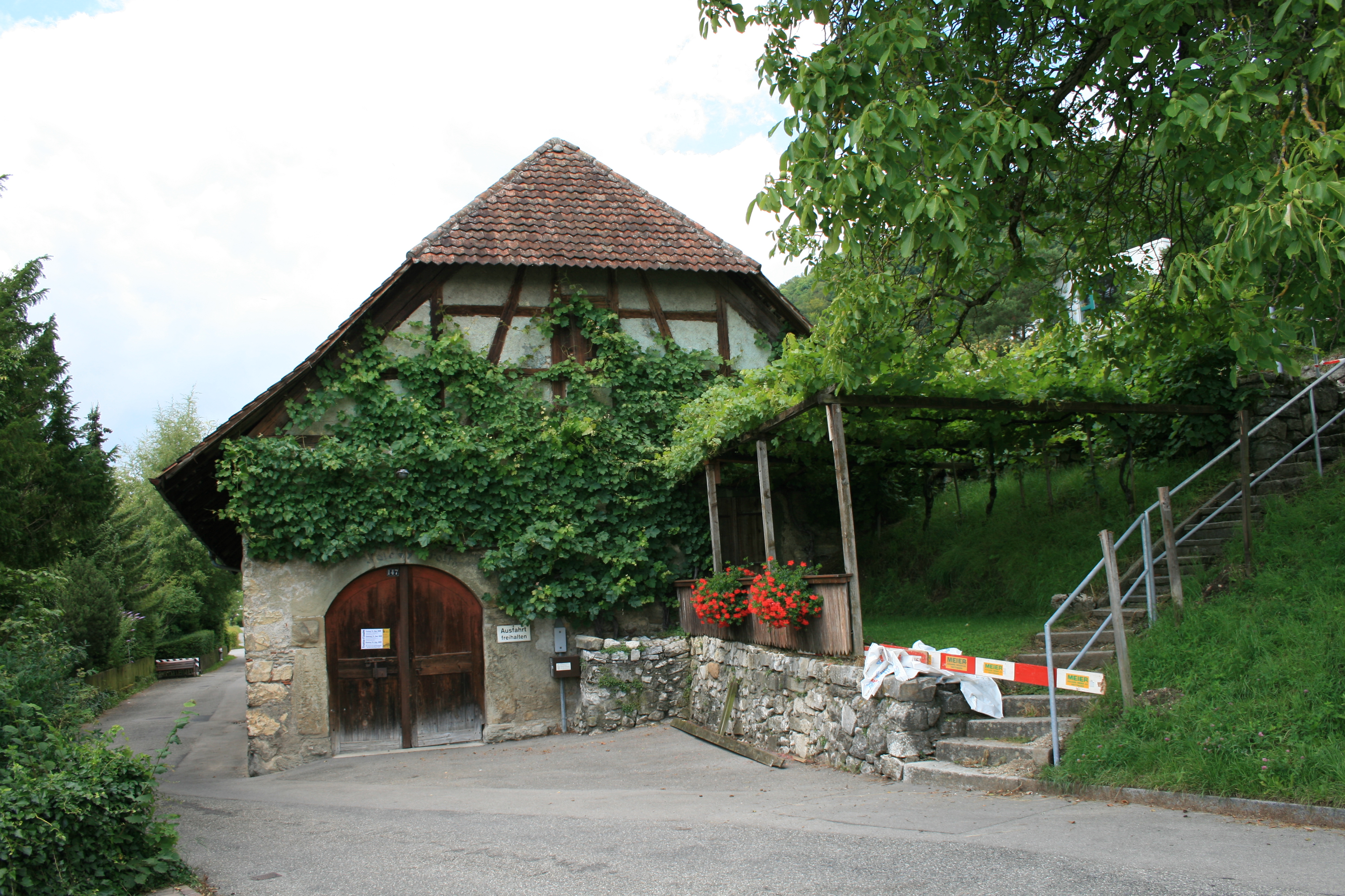 Rote Trotte, Wettingen, Schweiz